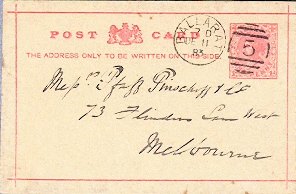 Australien (AUS) - Victoria (VIC) - Ballarat: Postkarte an Carl Pinschof. Abgestempelt am 11. Dezember 1883